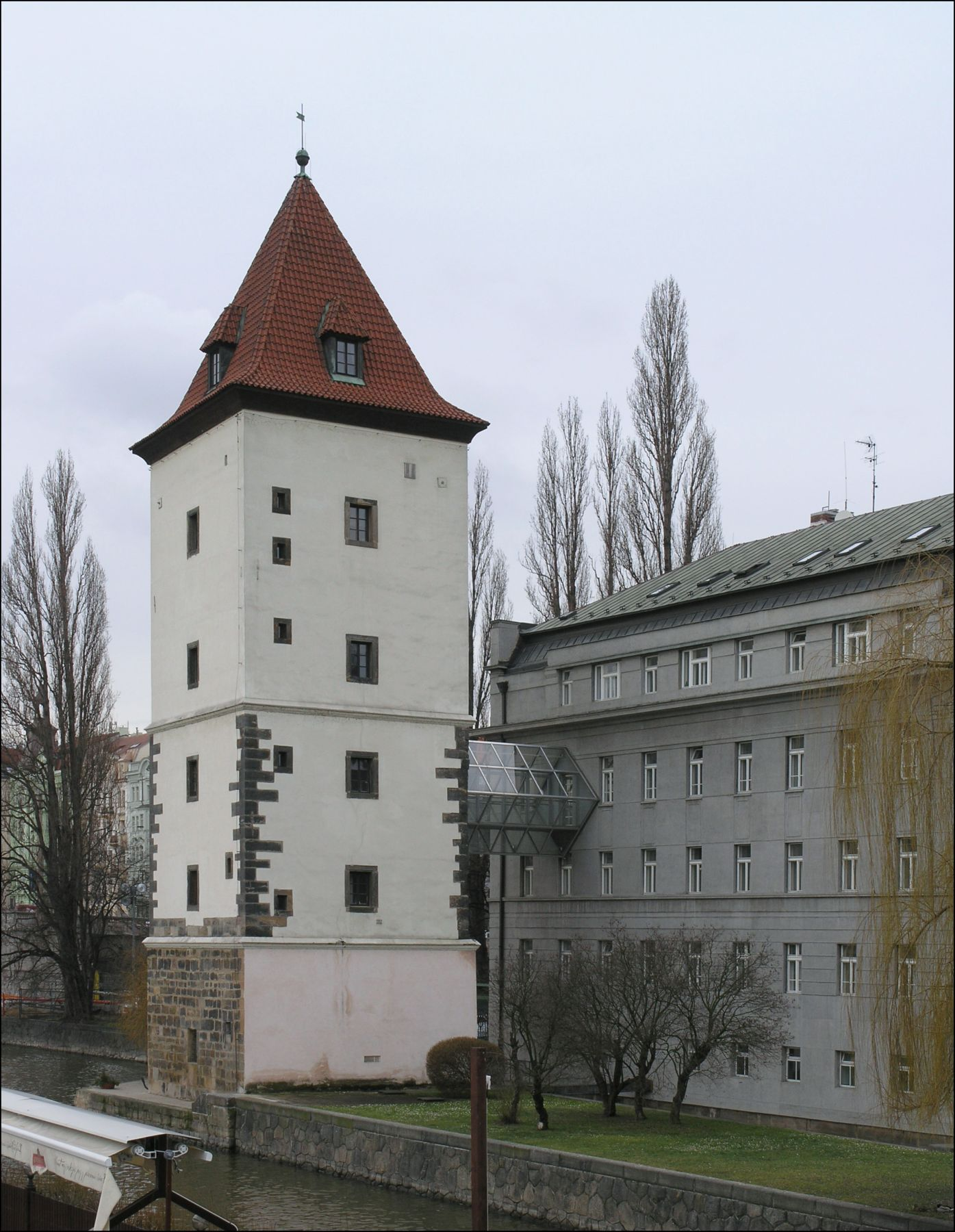 Praha, Petržílkovská (malostranská) vodárna